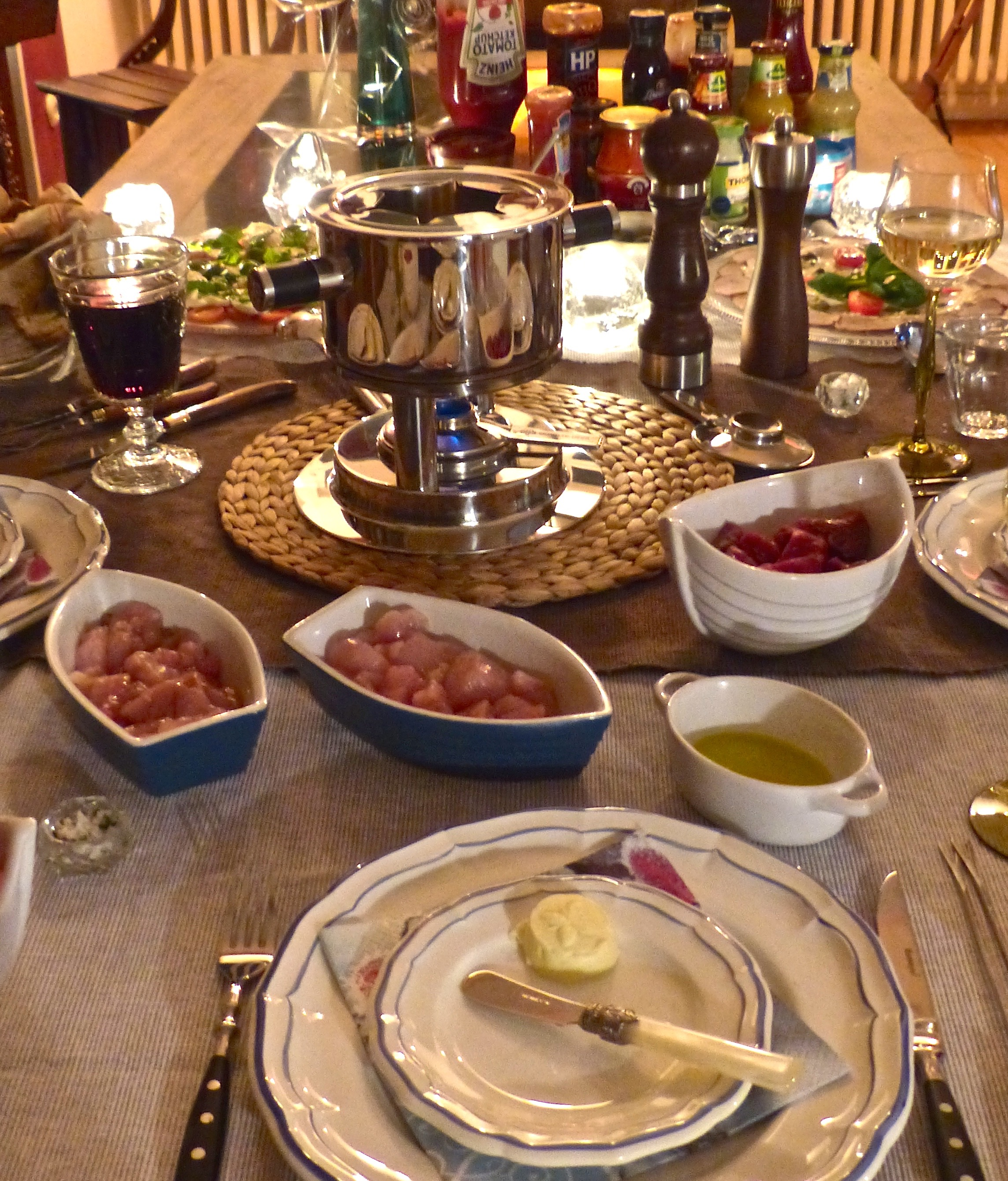 Silvesterfondue